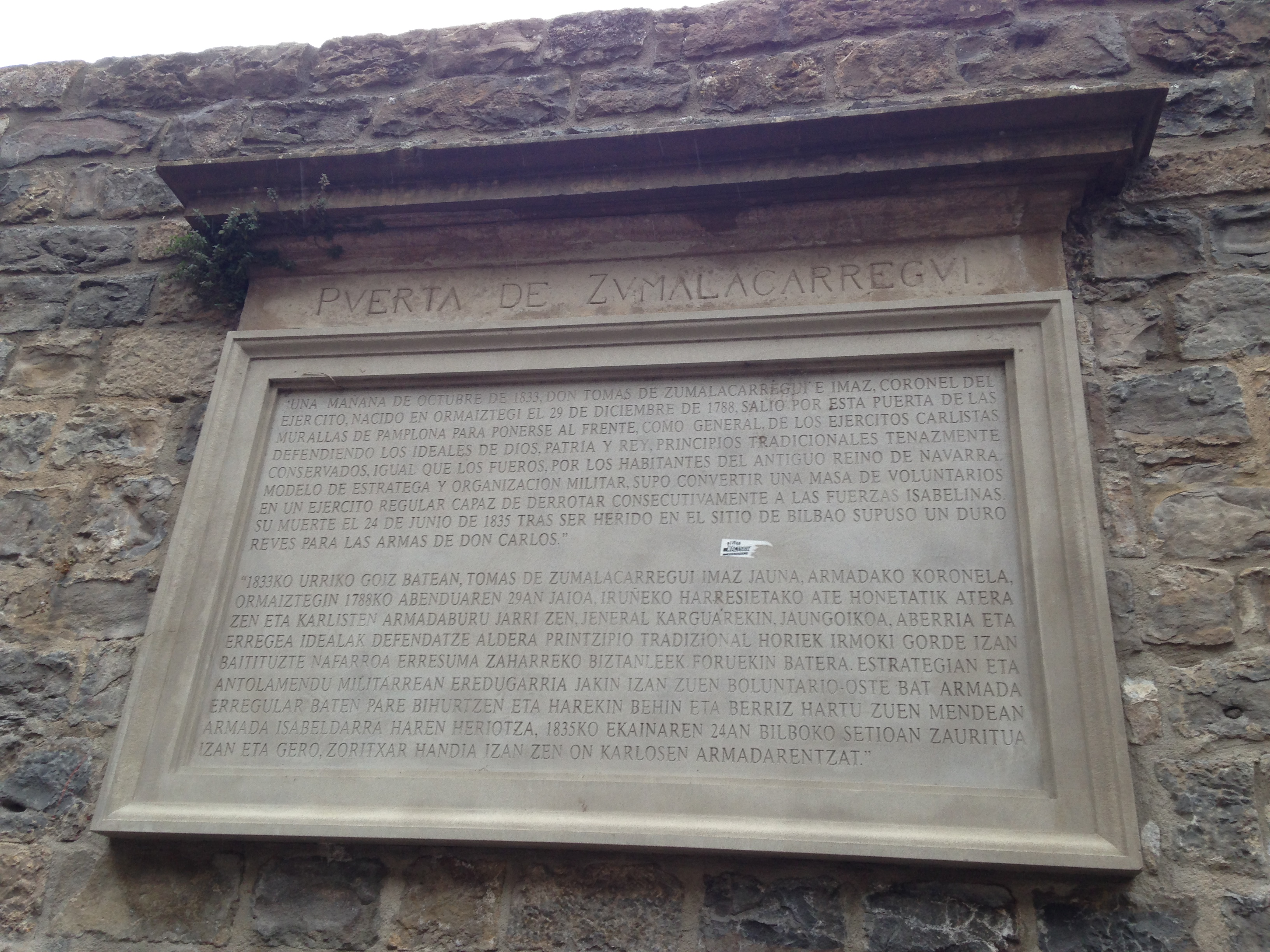 Iruñeko Frantziako Atean (Zumalakarregi Atean) dagoen harrizko idazkuna, Tomas Zumalakarregiren sarrera azaltzen duena